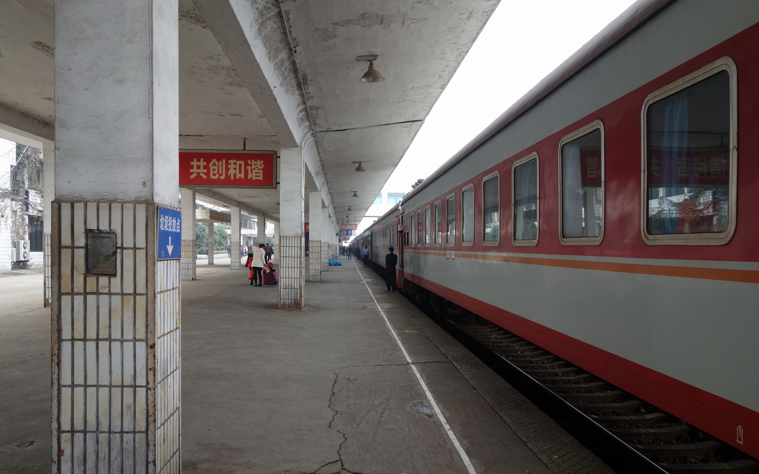 芜湖站1号站台